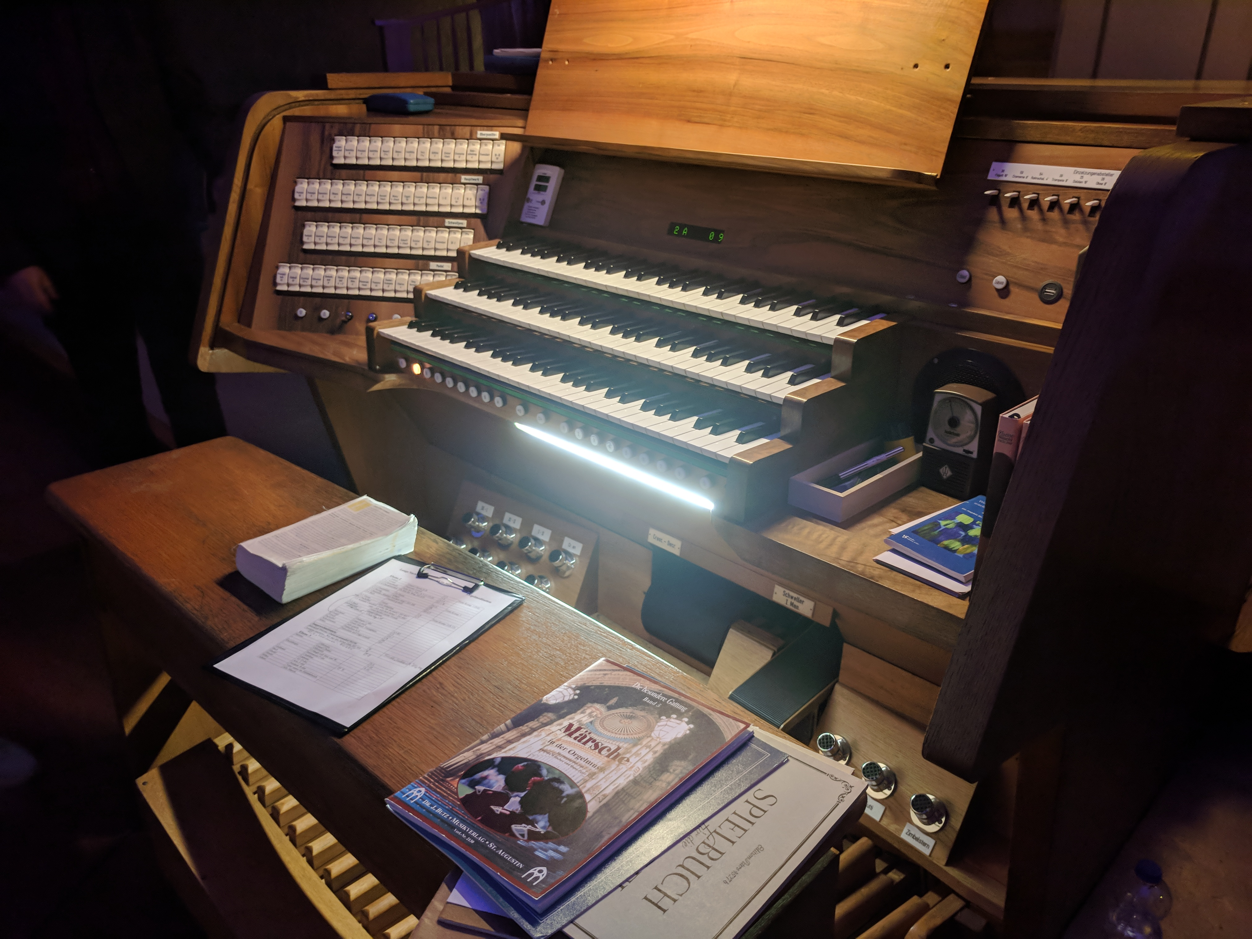 Spieltisch der Orgel von Johann Georg Allgeyer d. Ä. der Johanneskirche zu Crailsheim.